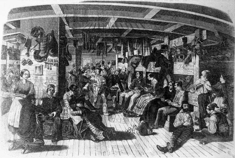 Deutsche Auswanderung, Auswanderer nach Amerika, Inneres des Auswandererschiffes "Samuel Hop"